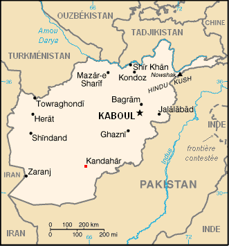 Kandahar en Afghanistan